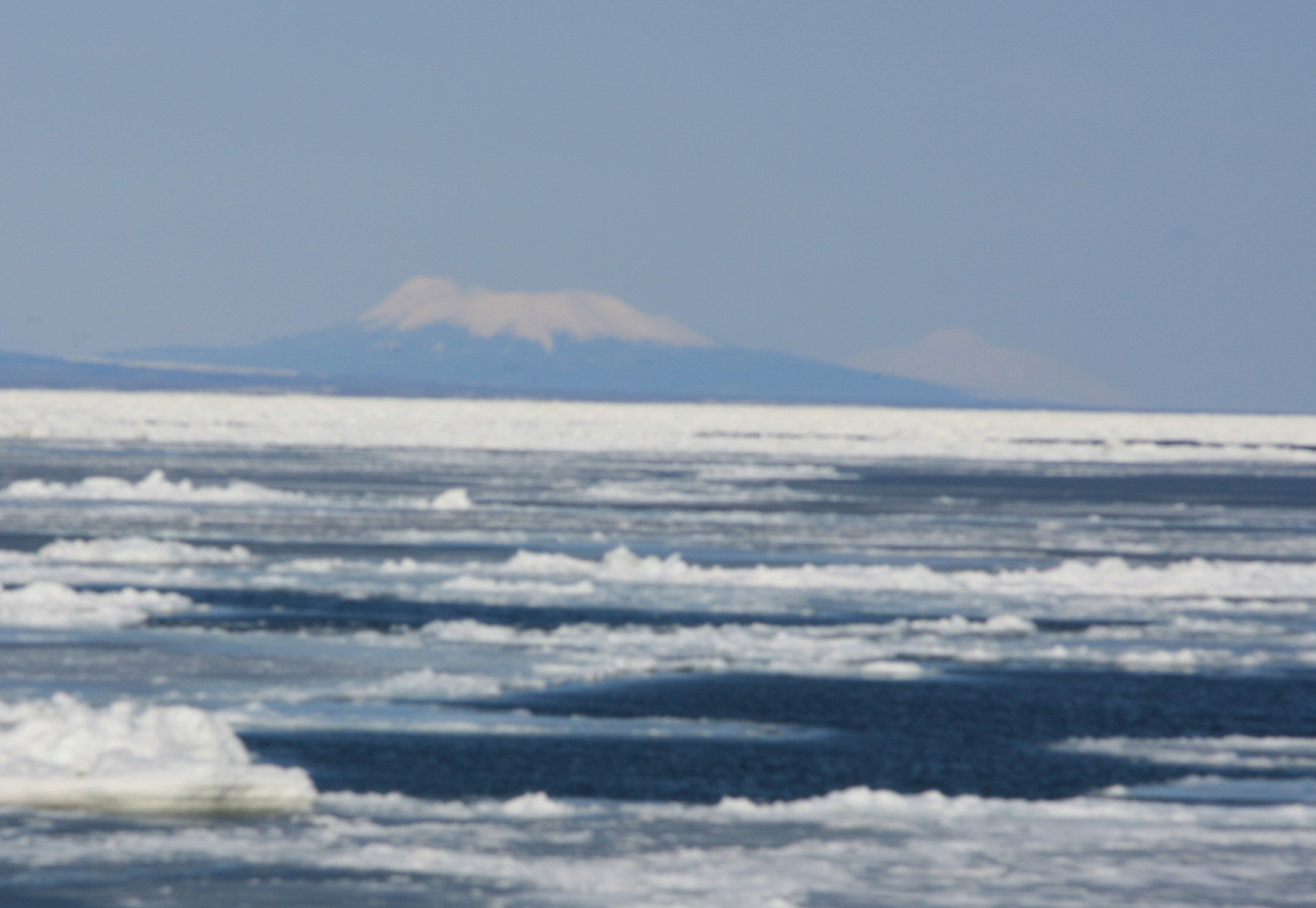 野付半島から望む国後島の羅臼山と爺々岳